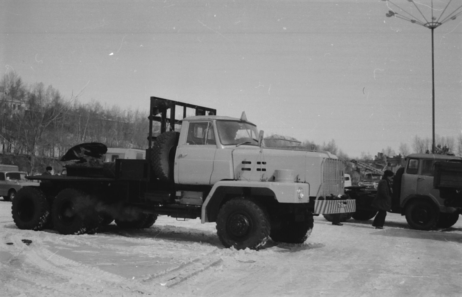 Седельный тягач Komatsu-Nissan KNWF 12T, сзади КАЗ-608 1978 год